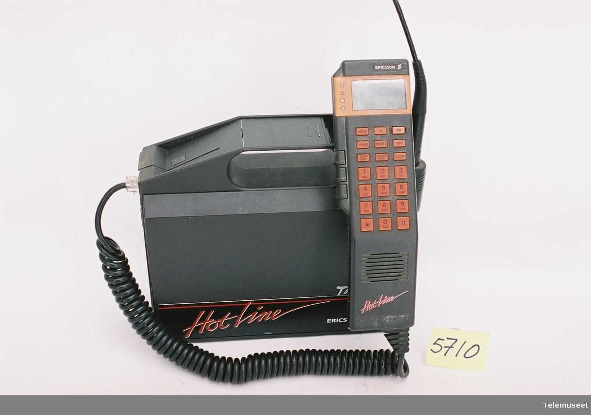 Ericsson Hotline NMT 450. Tilhørte Rolf Snare, Kongsvinger hadde nr.94175574. Og gitt til Norsk Telemuseum feb. 2003. Produksjon: 1987 Type: Hotline 431 Code: KRC 101 1002/A Serie nr: 702873